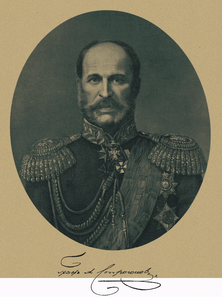 Граф Алекса́ндр Григо́рьевич Стро́ганов (31 декабря 1795 — 2 августа 1891)